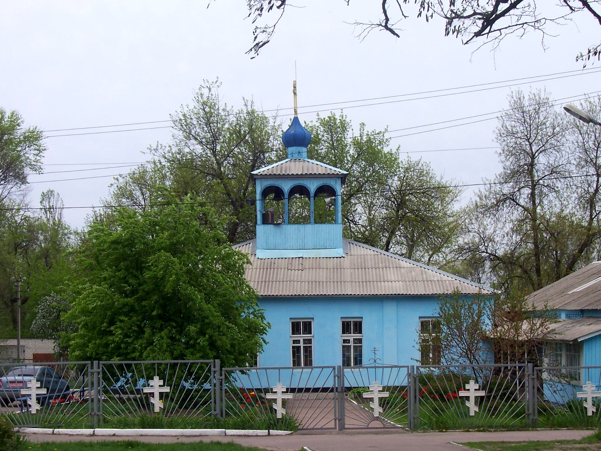 Church of Verkhnodniprovsk - Ukraine/Церковь в Верхнеднепровск - Украина